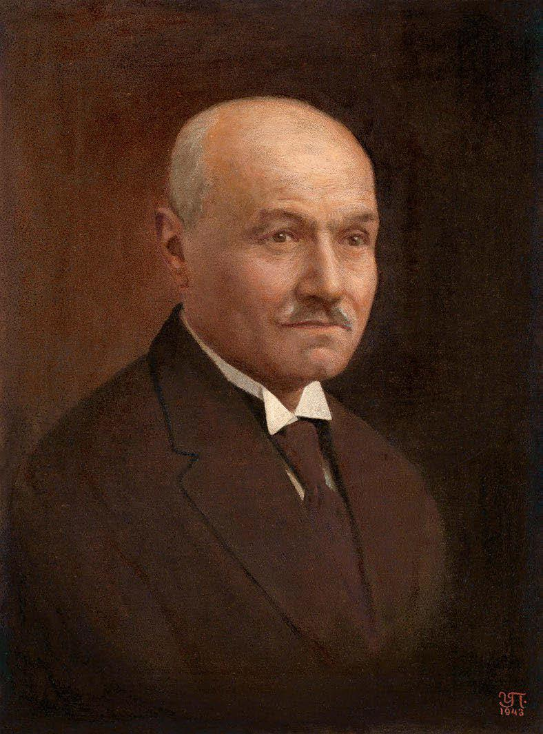 Михаило Петровић Алас (1868-1943), рад сликара Уроша Предића